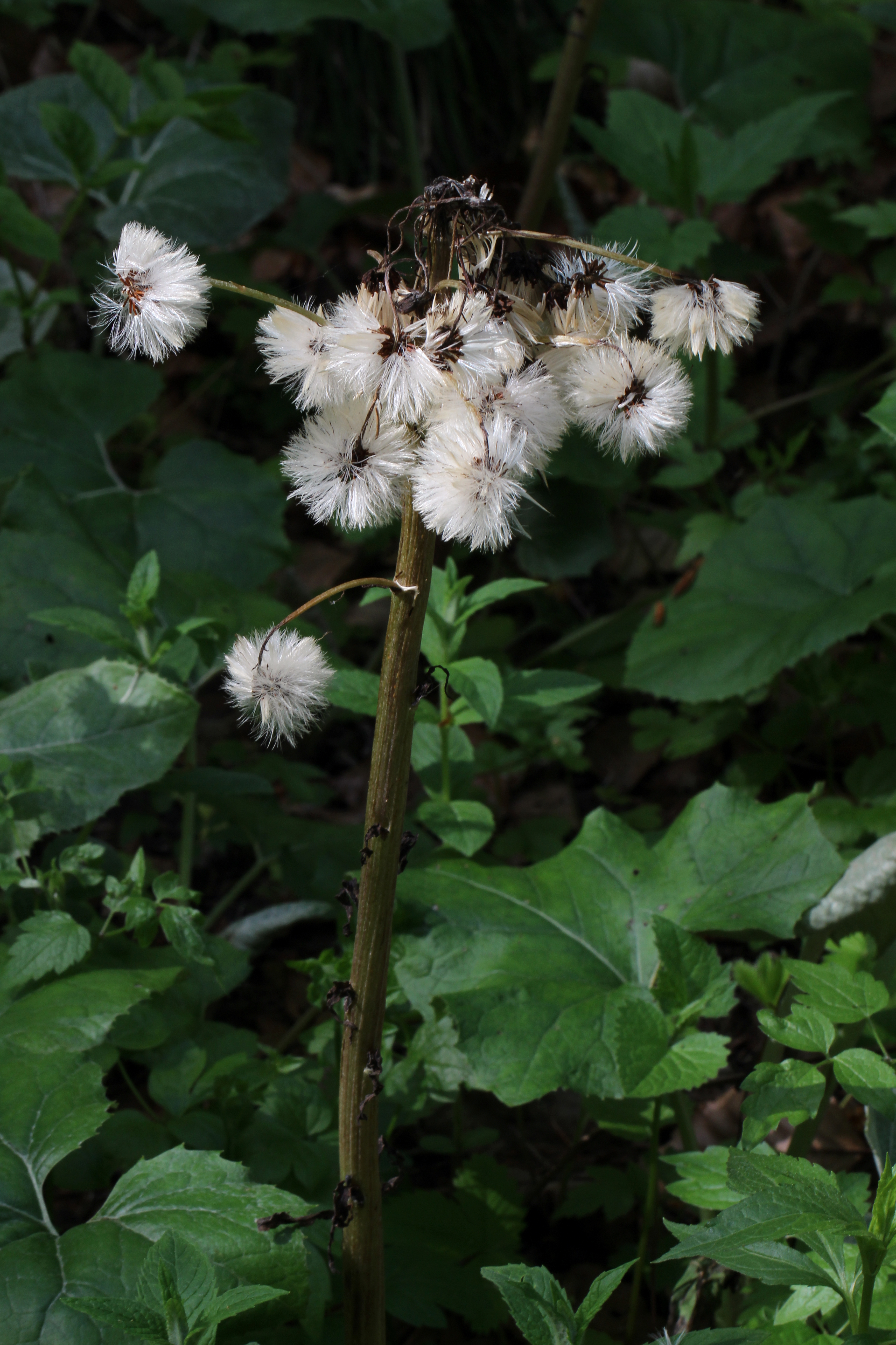 Reife Alpen-Pestwurz (Petasites paradoxus) im Nationalpark Gesäuse This file shows the National Park Gesäuse in Austria.